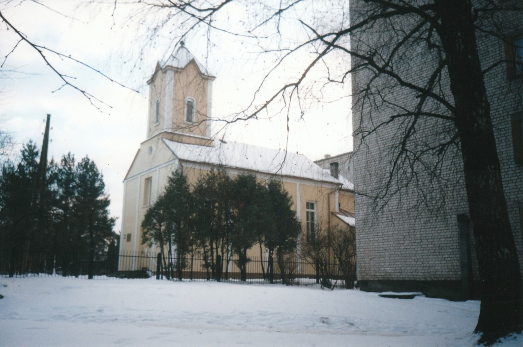 Valmieras katoļu baznīca 1999